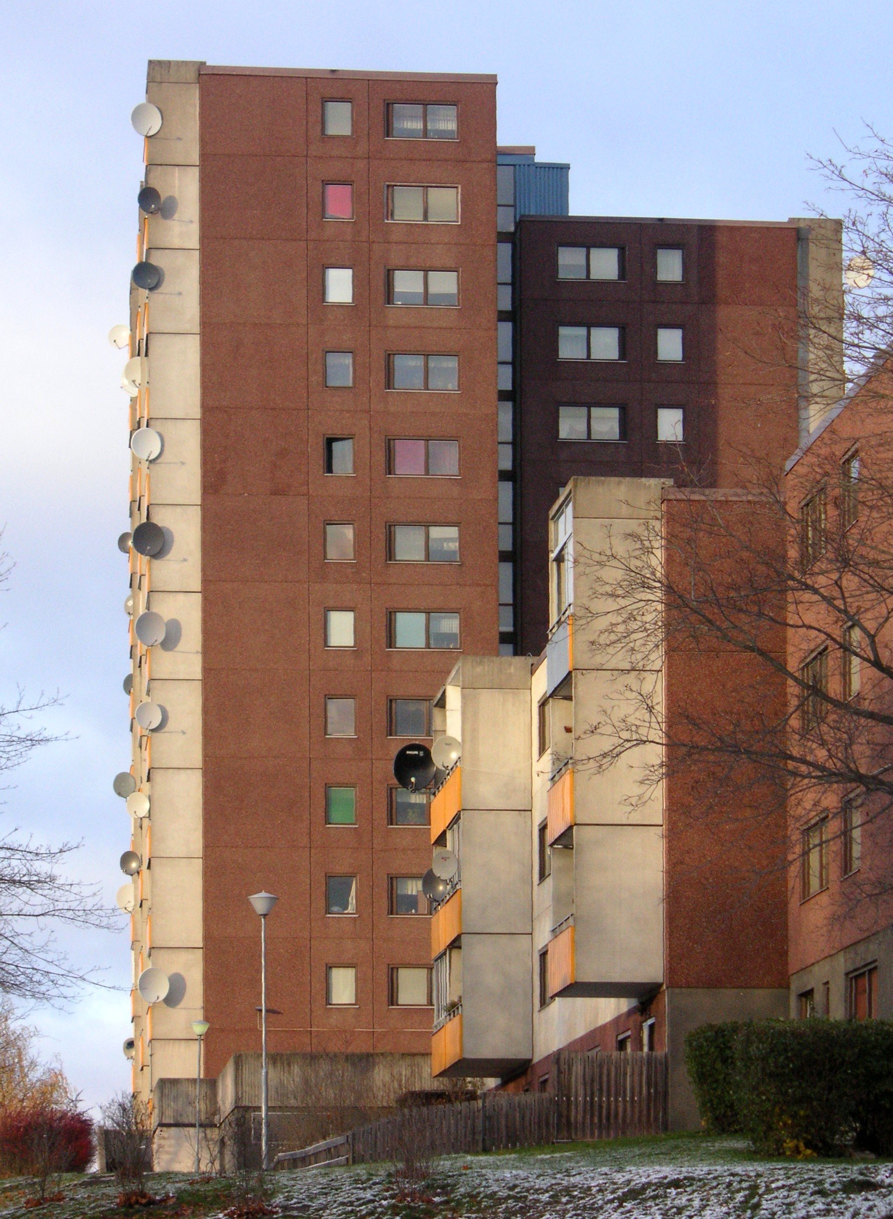 Fittja i Botkyrka kommun Sverige